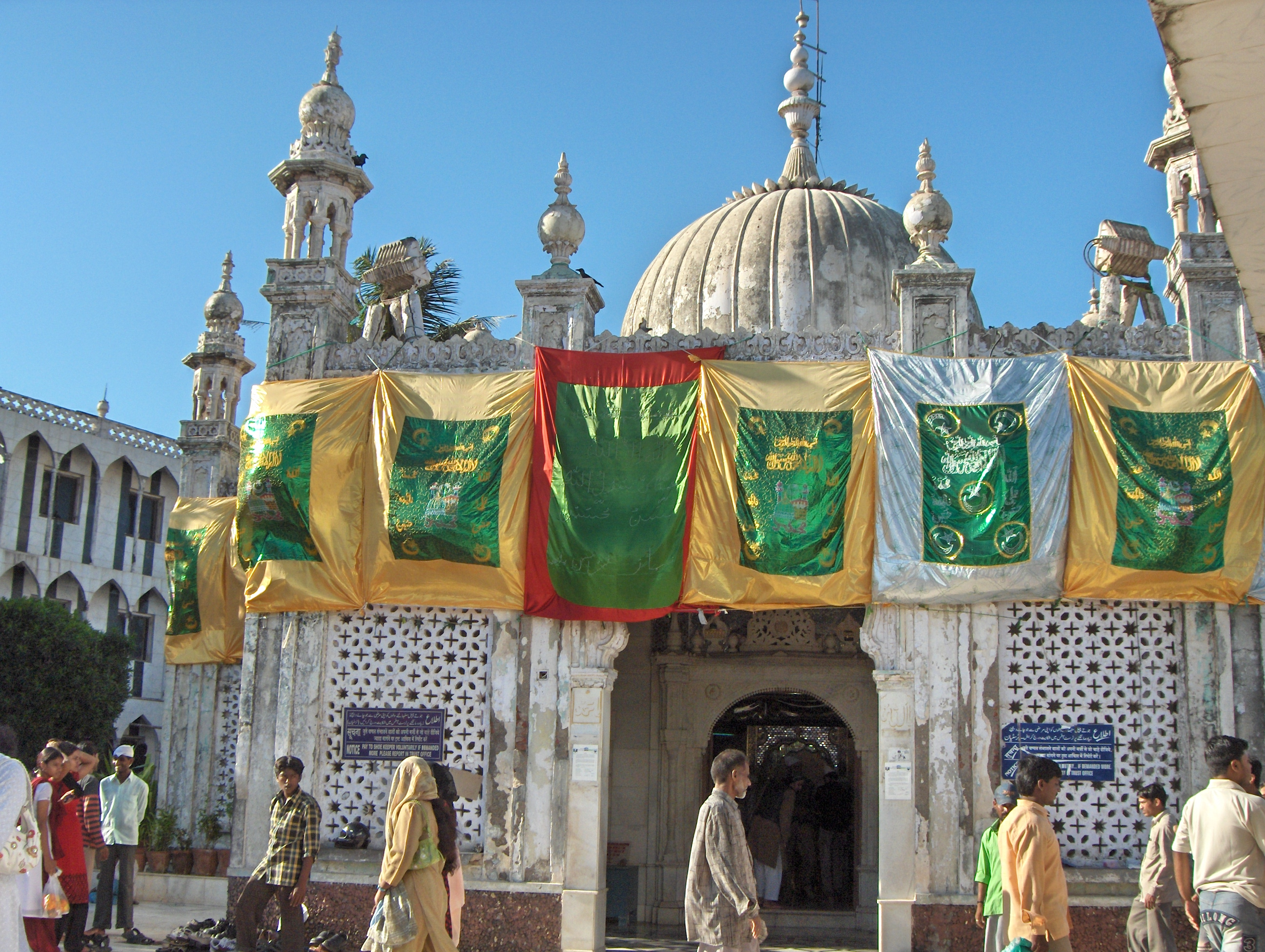 Haji Ali Dargah at Worli, Mumbai